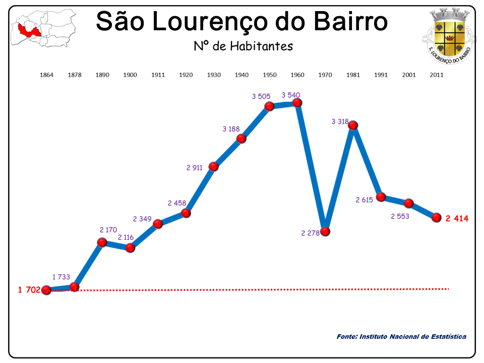 Freguesia